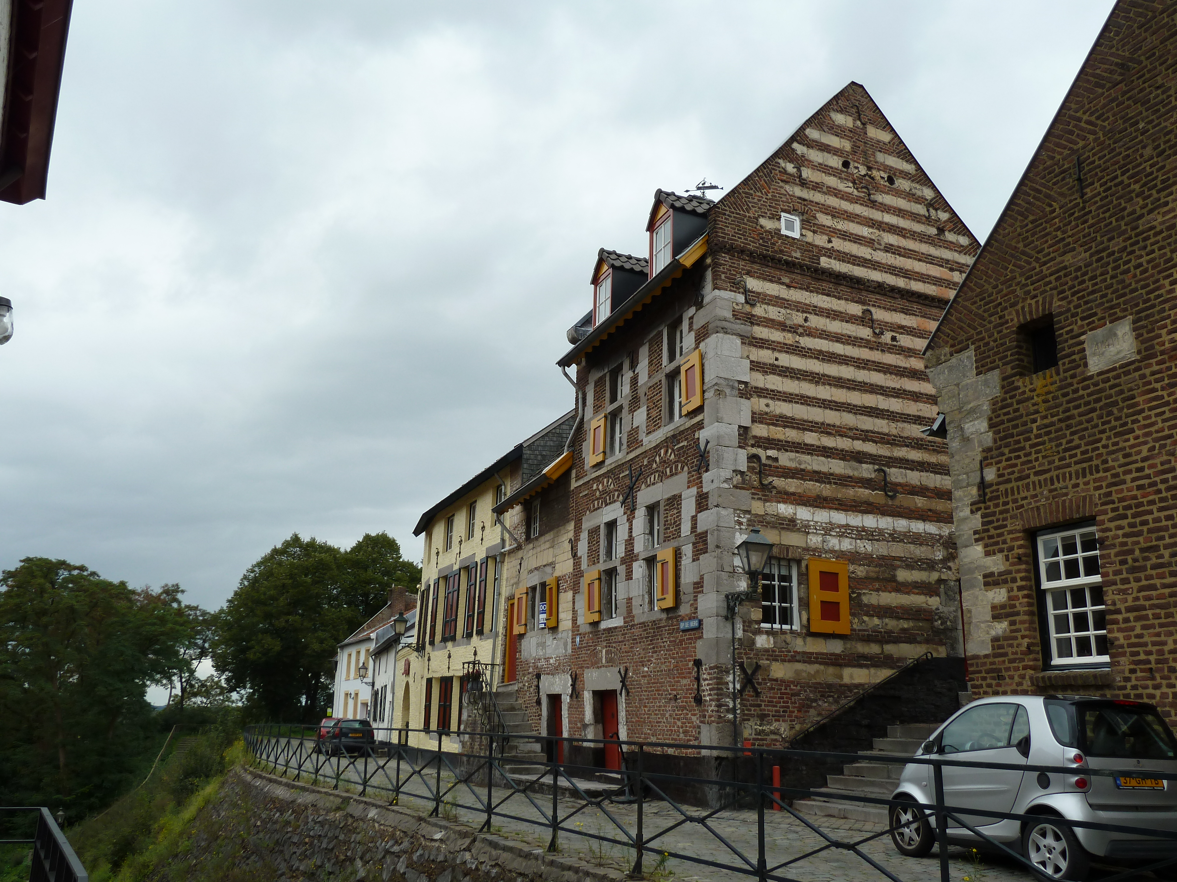 Op de Berg, Elsloo, Limburg, Nederland